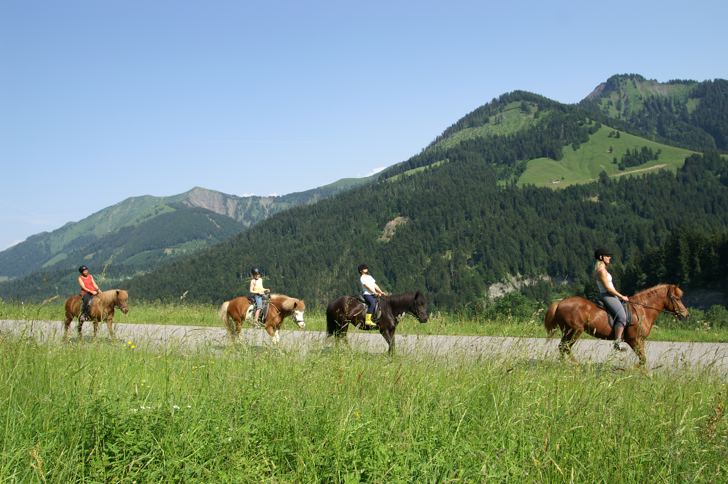 Reiten im Enbit, Dornbirn im Hintergrund die Ilgenwald Alpe